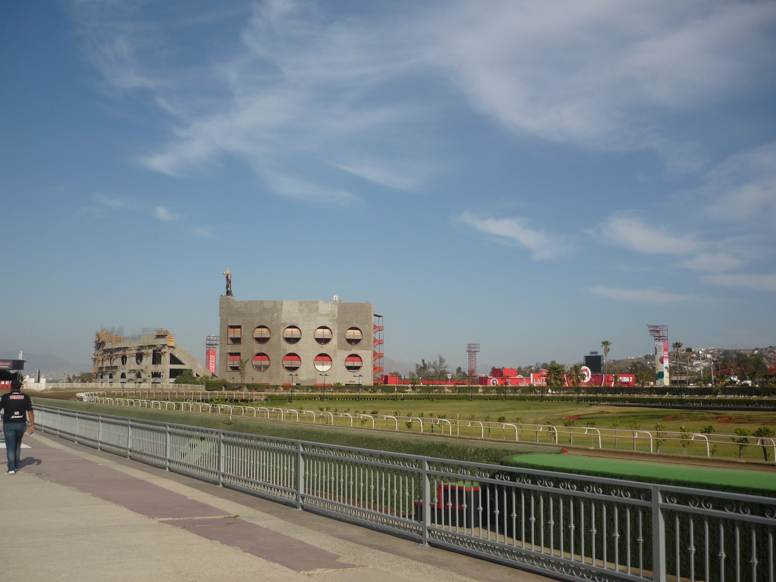 estadiocaliente